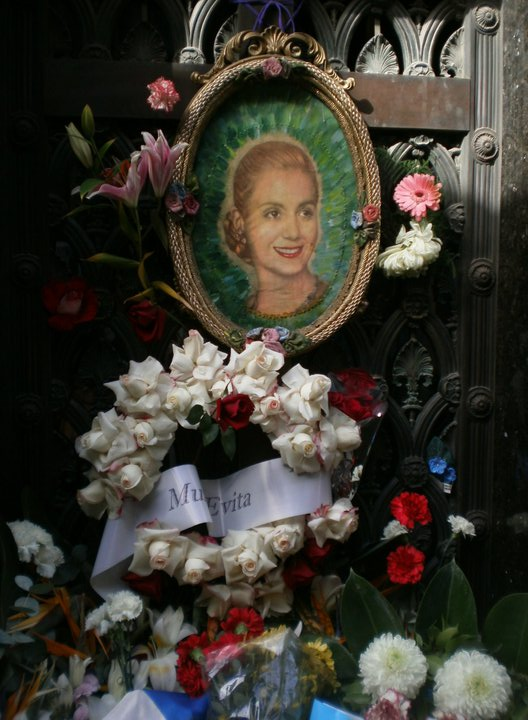 Tumba de Eva Perón, Cementerio de La Recoleta, Buenos Aires.